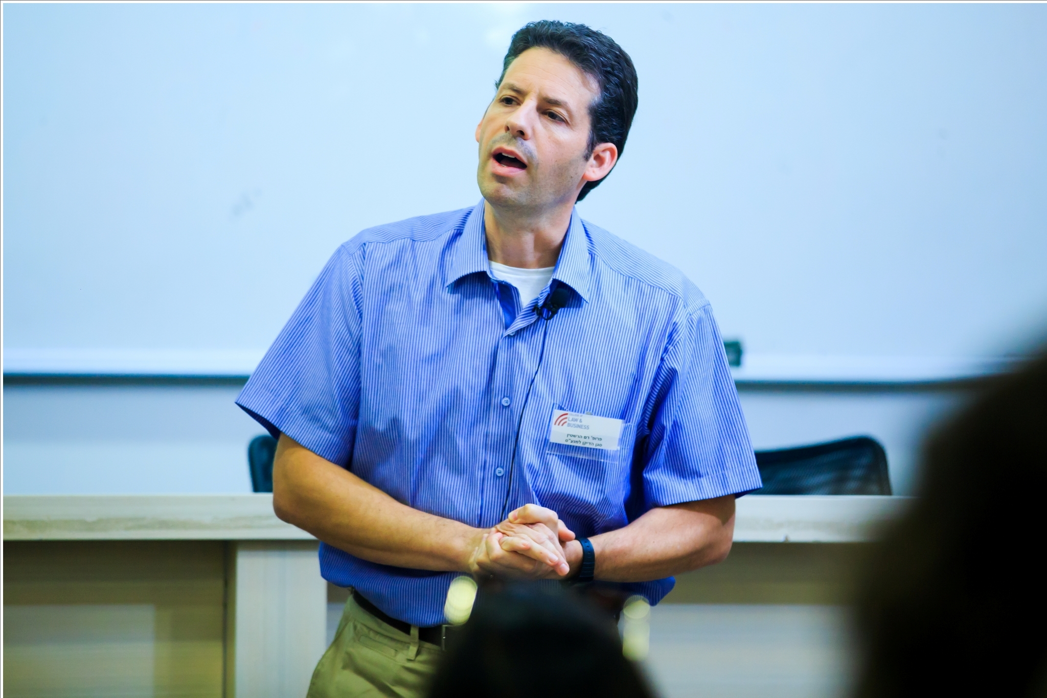 פרופ' רם הרשטין בהרצאה המרכז האקדמי למשפט ולעסקים בר"ג